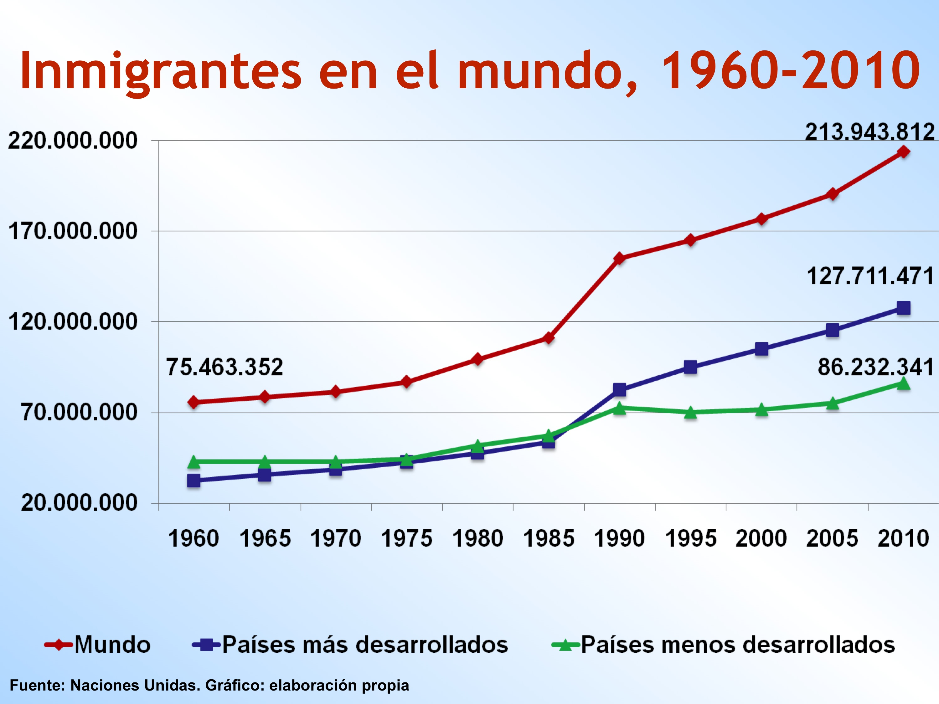 Inmigrantes en el mundo, 1960-2010